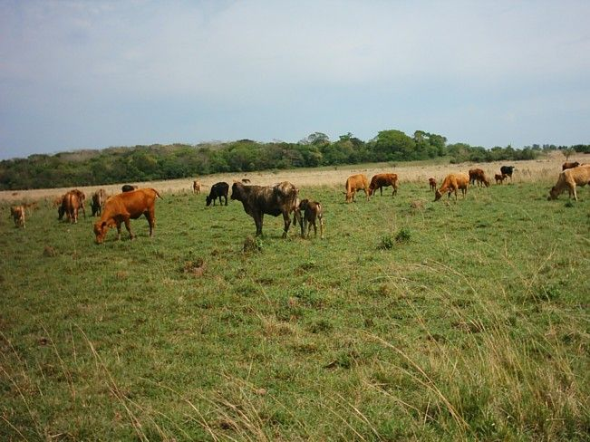 campos